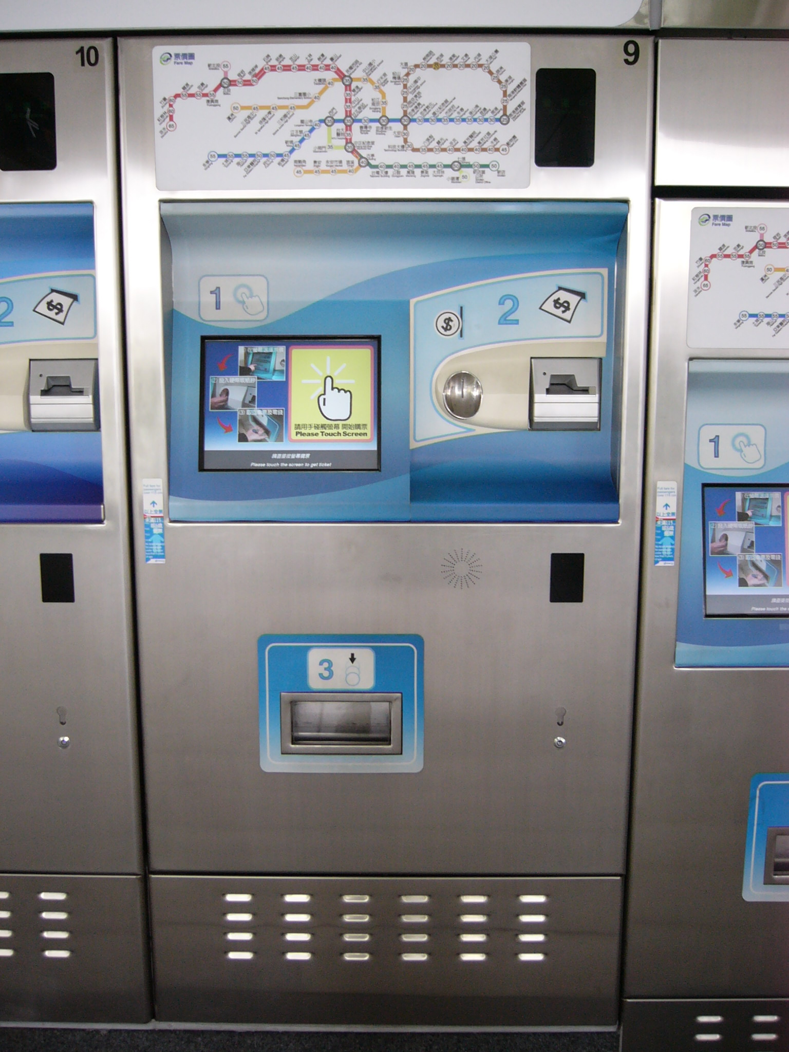 中文（台灣）: 台北捷運西湖車站9號觸控式單程票自動售票機。